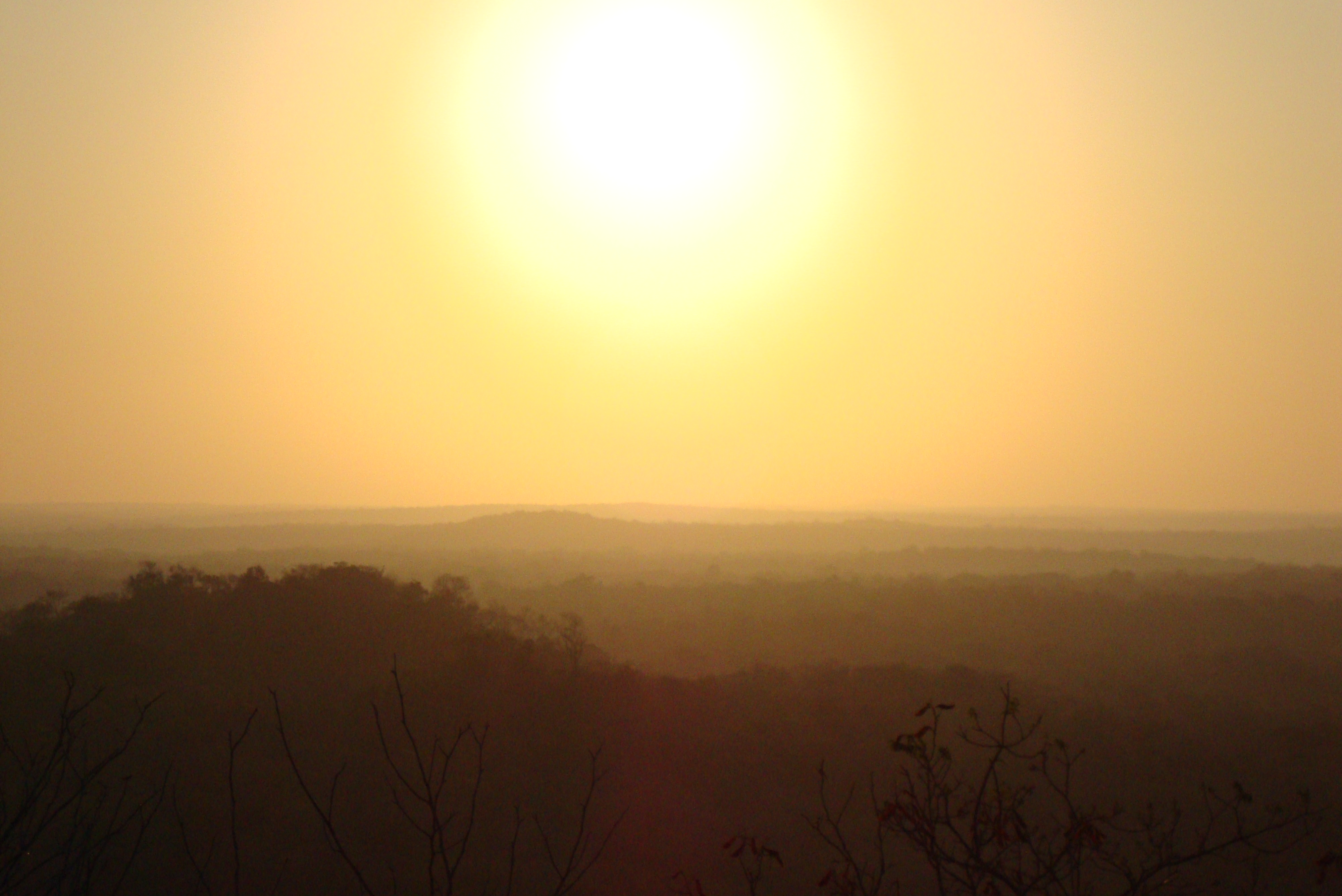 Amanecer sobre la pirámide de Nakbé